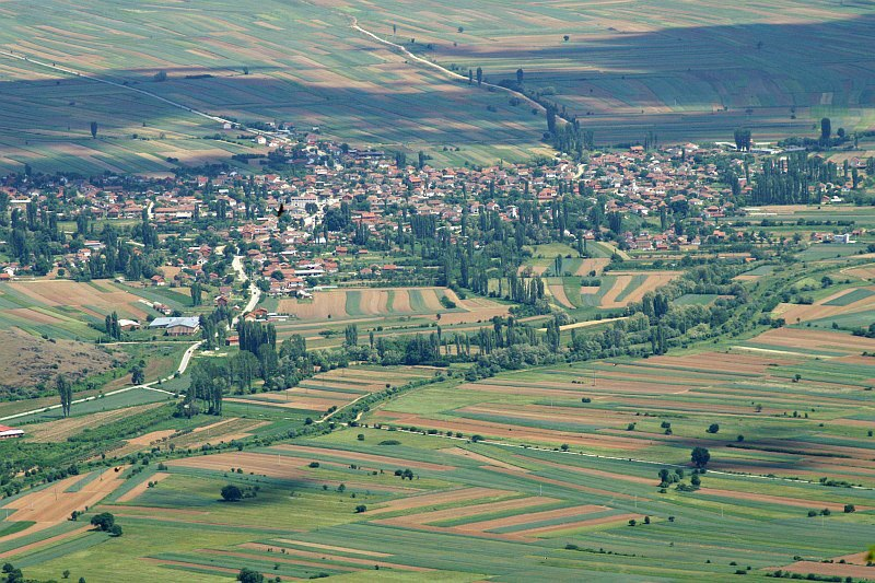 Кривогаштани